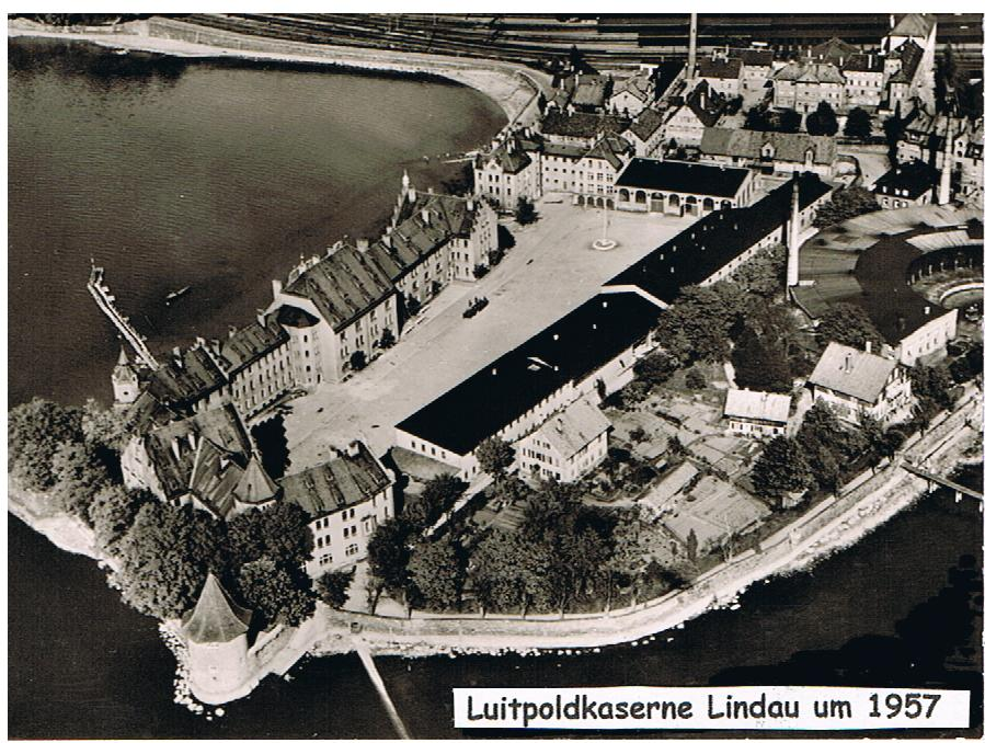 Luftaufnahme Luitpoldkaserne Lindau ca. 1957